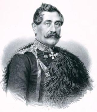 Kniaz' Ivan Konstantinovich Bagration-Mukhranskii, General- Maior